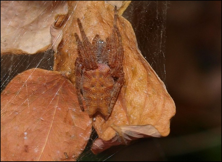 Cyrtophora purpurea dans sa retraite (feuille enroulée), après ouverture